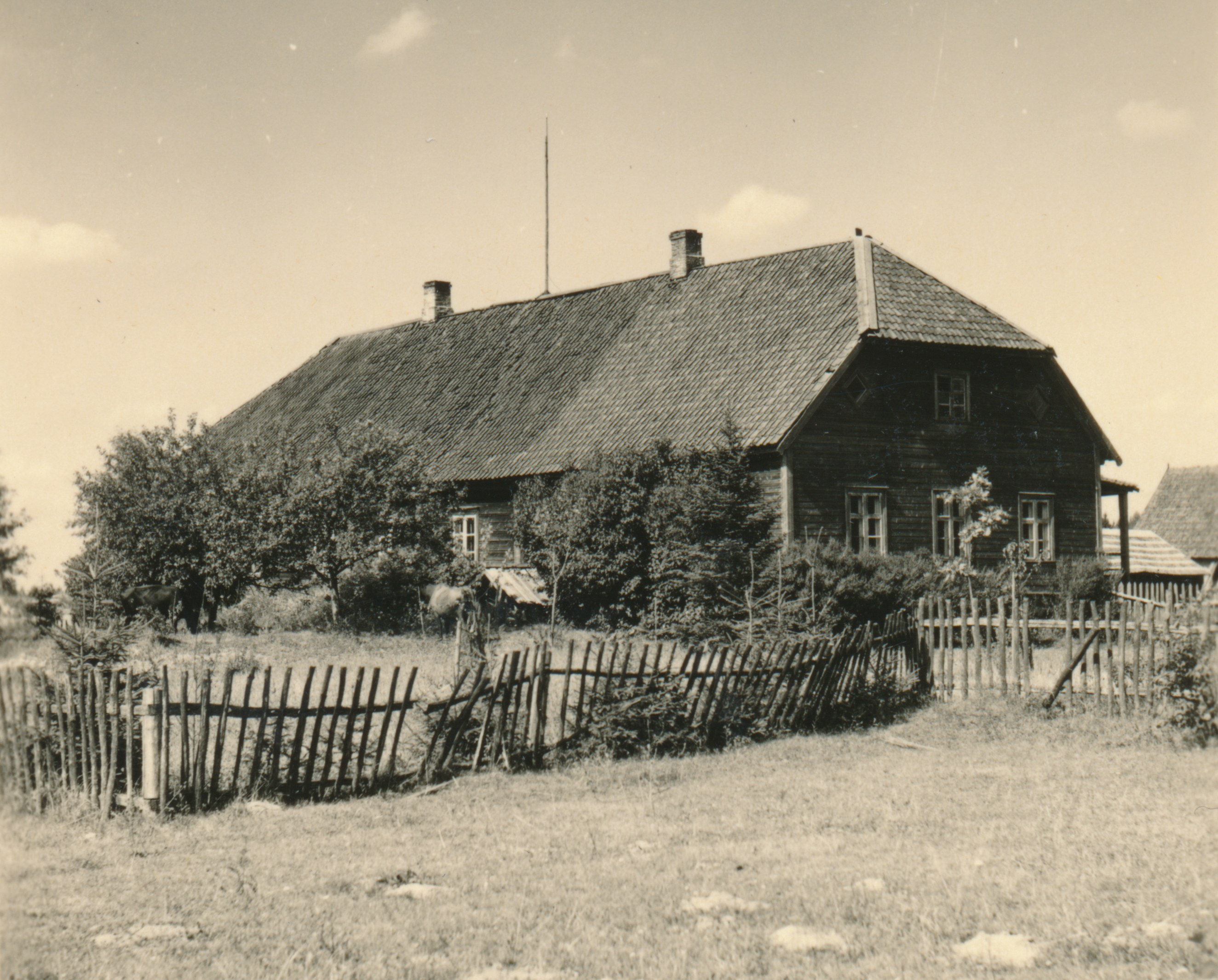 Holstre Pulleritsu koolimaja